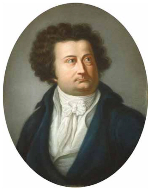 Bildnis August Wilhelm Iffland, spiegelbildliche Kopie nach einem Gemälde von Johann Heinrich Schröder, Pastellkreide auf Karton, 35,5 x 28,5 cm Theaterwissenschaftliche Sammlung der Universität zu Köln, Schloss Wahn, Inv.Nr. 30098